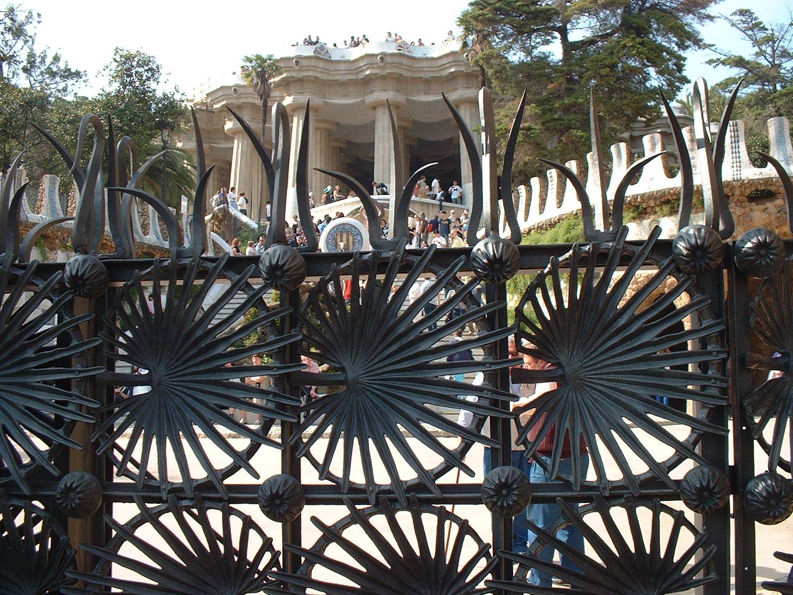 Grille d'entrée du Parc Güell à Barcelone